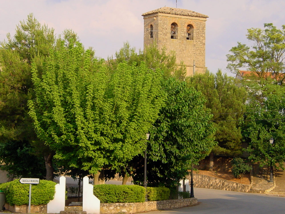 Iglesia de El Peral